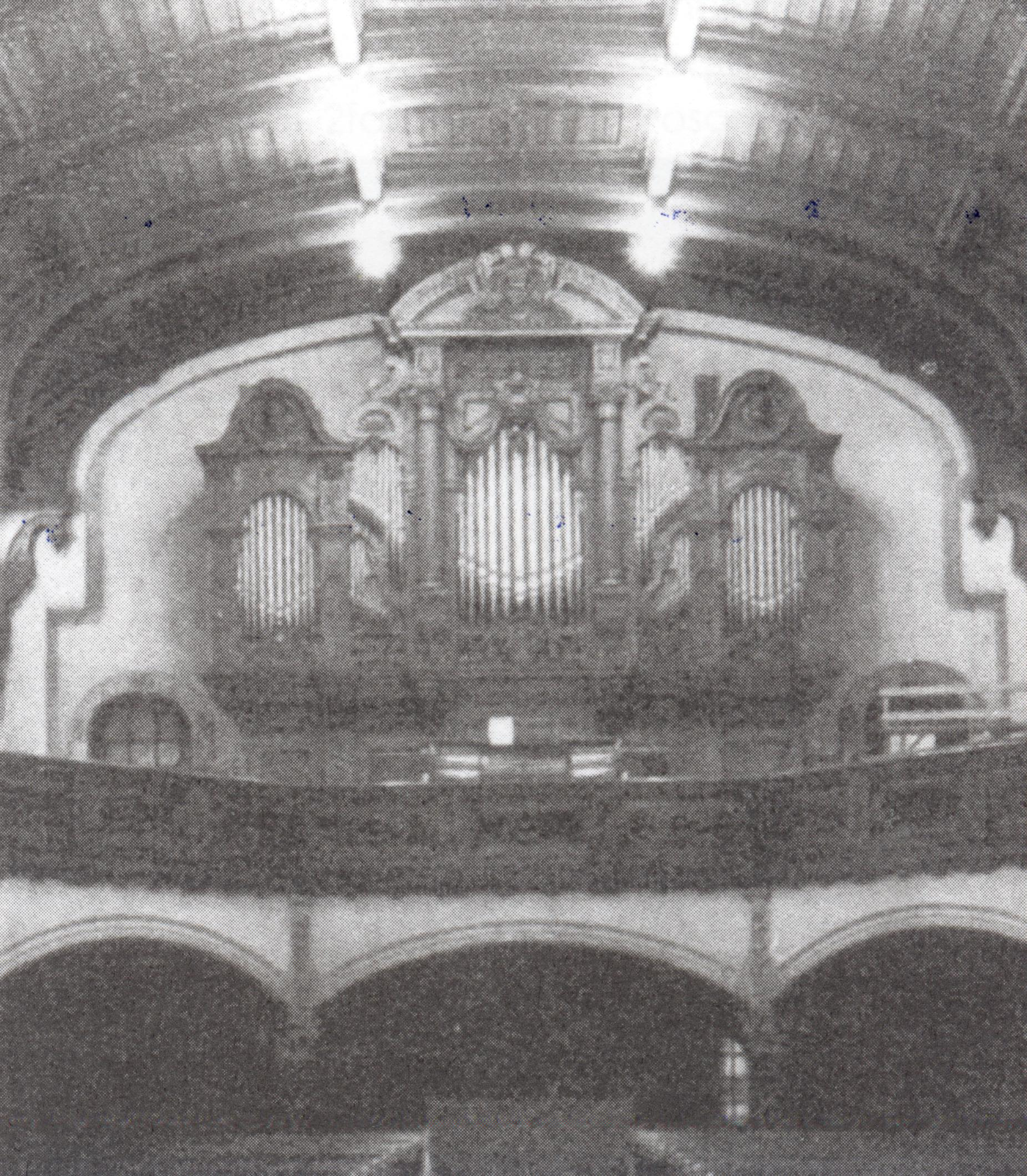 Orgel der Auferstehungskirche 1902